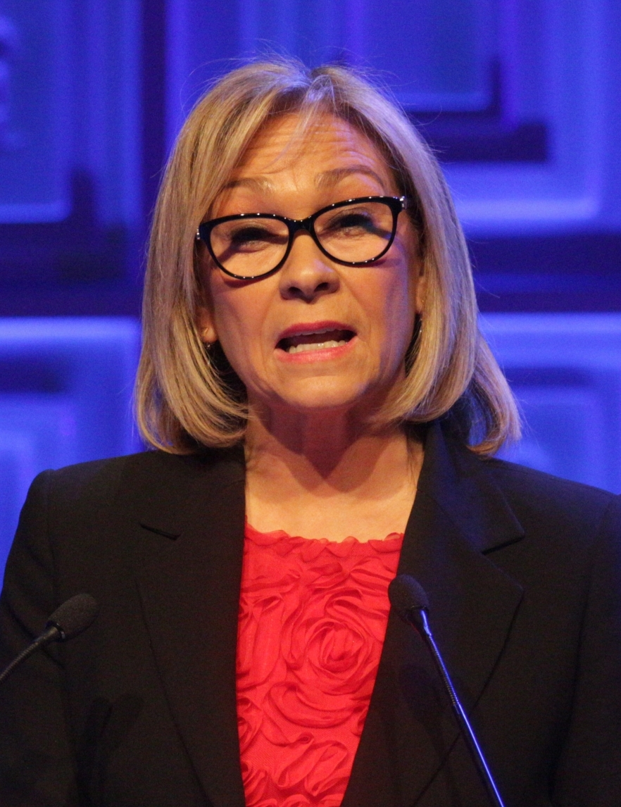 WTTC Global Summit 2015